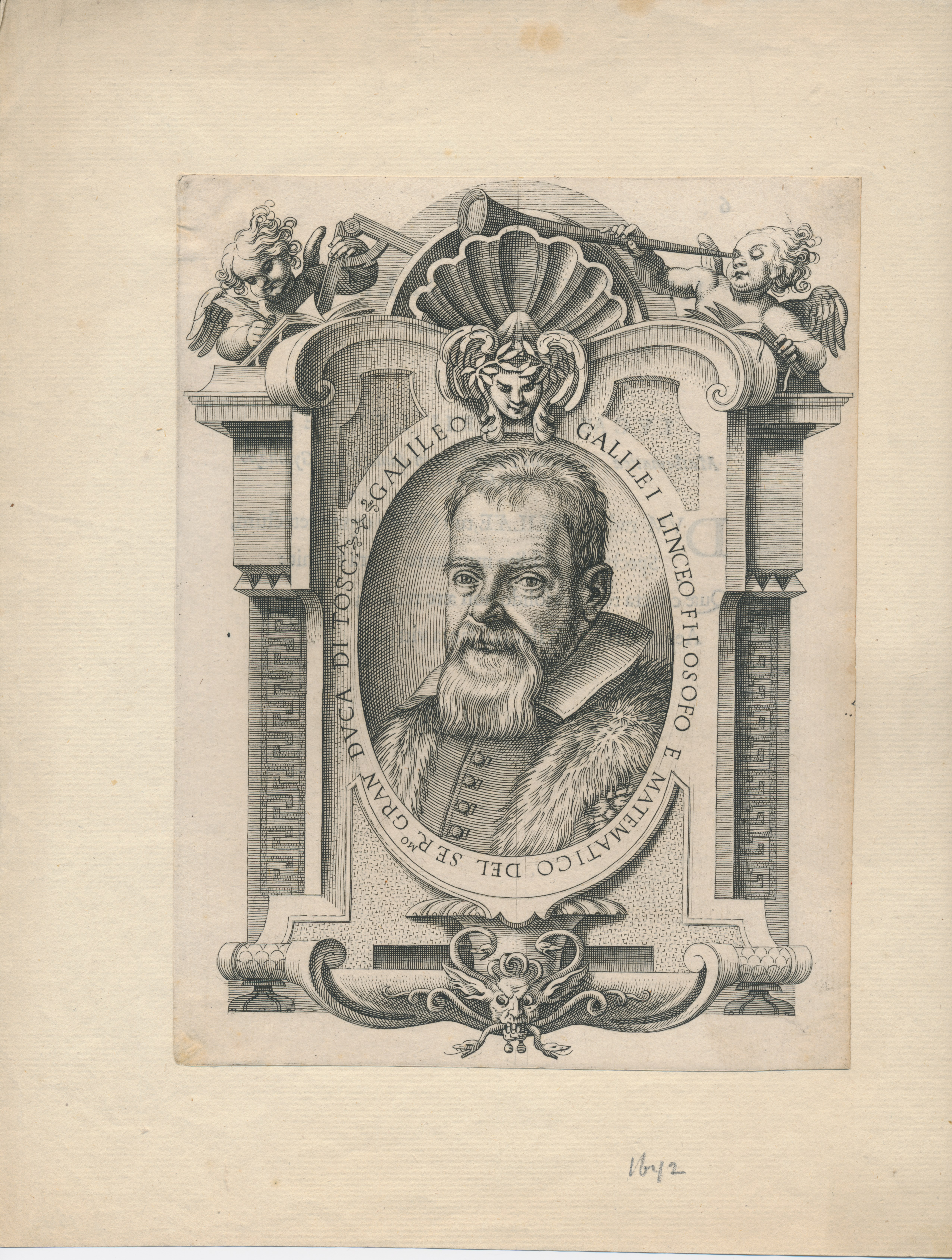 Galileo Galilei 1564-1642